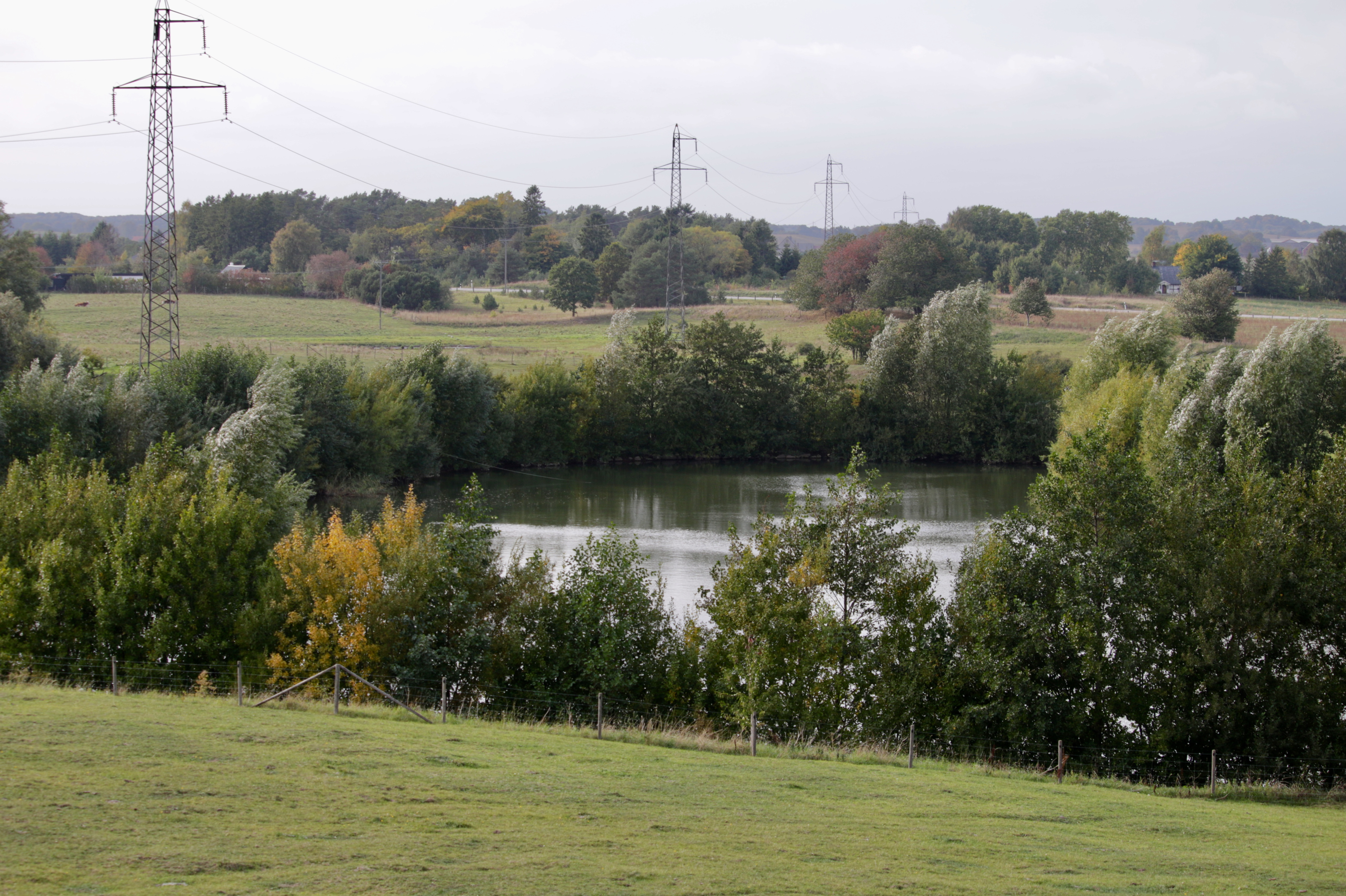 Tryde naturreservat